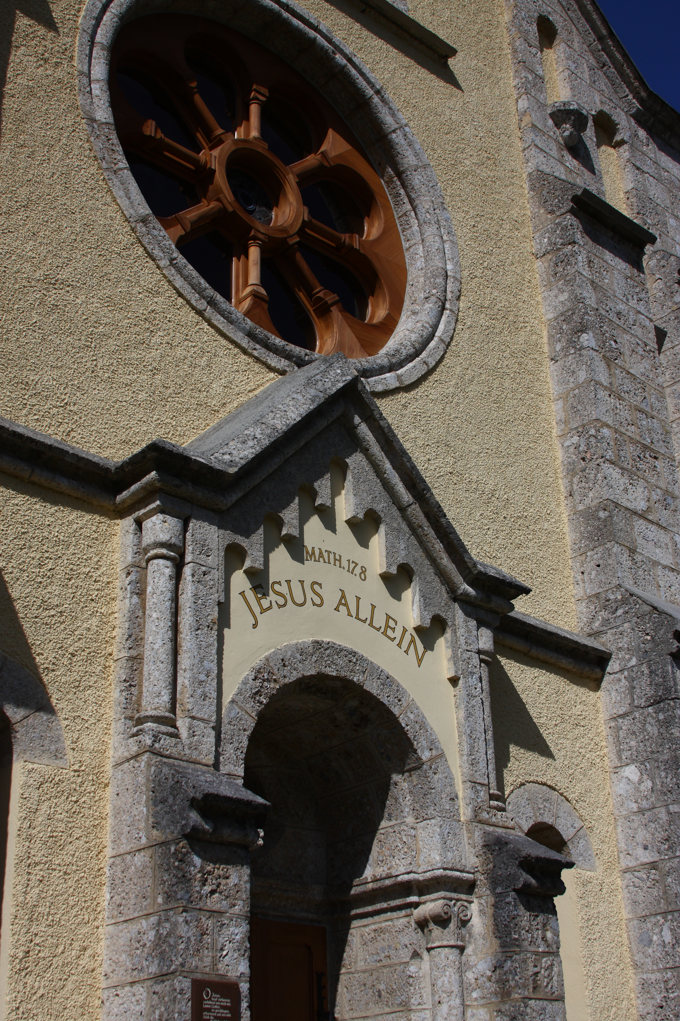 Evang. Pfarrkirche A.B.